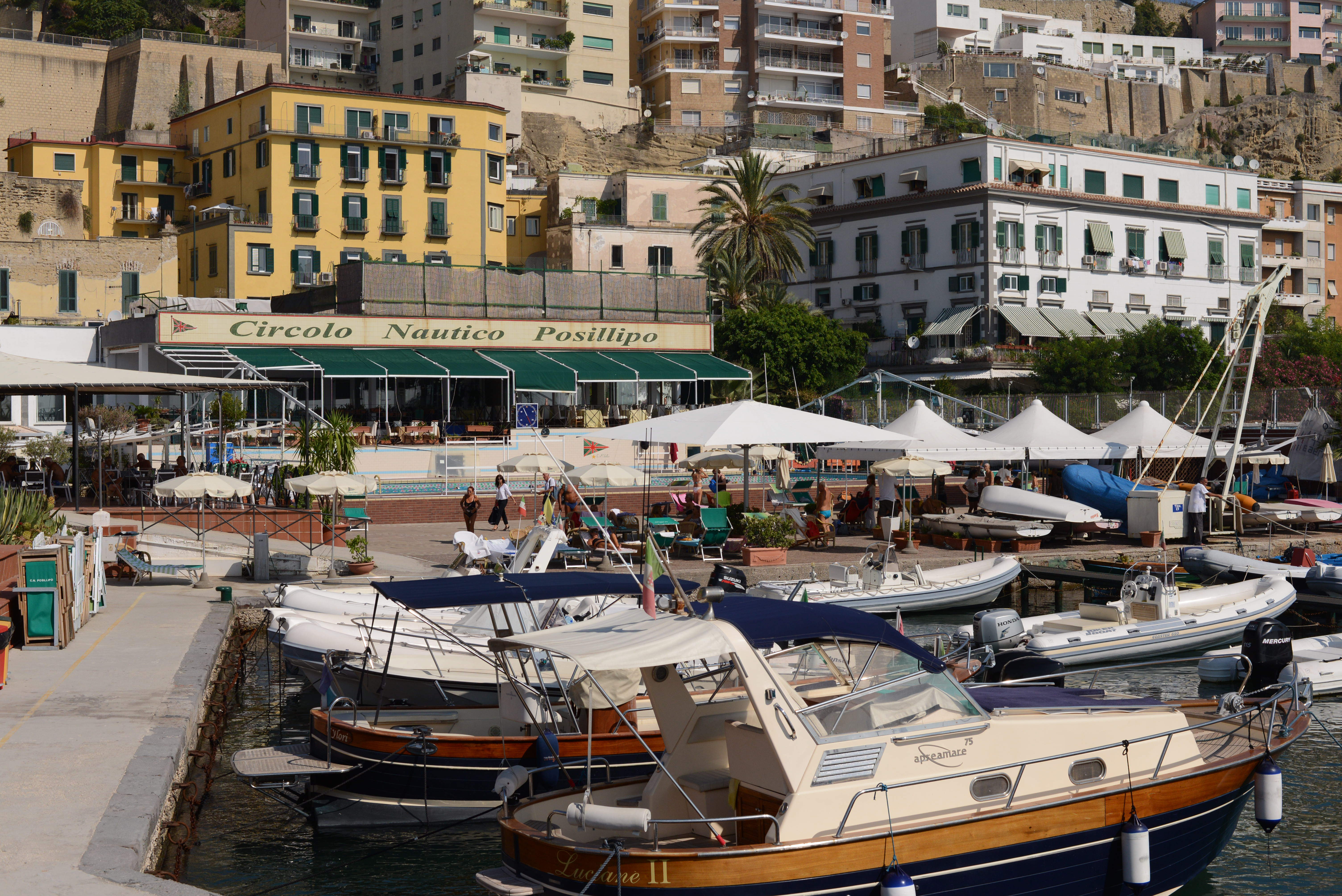 Circolo Nautico Posillipo, porto